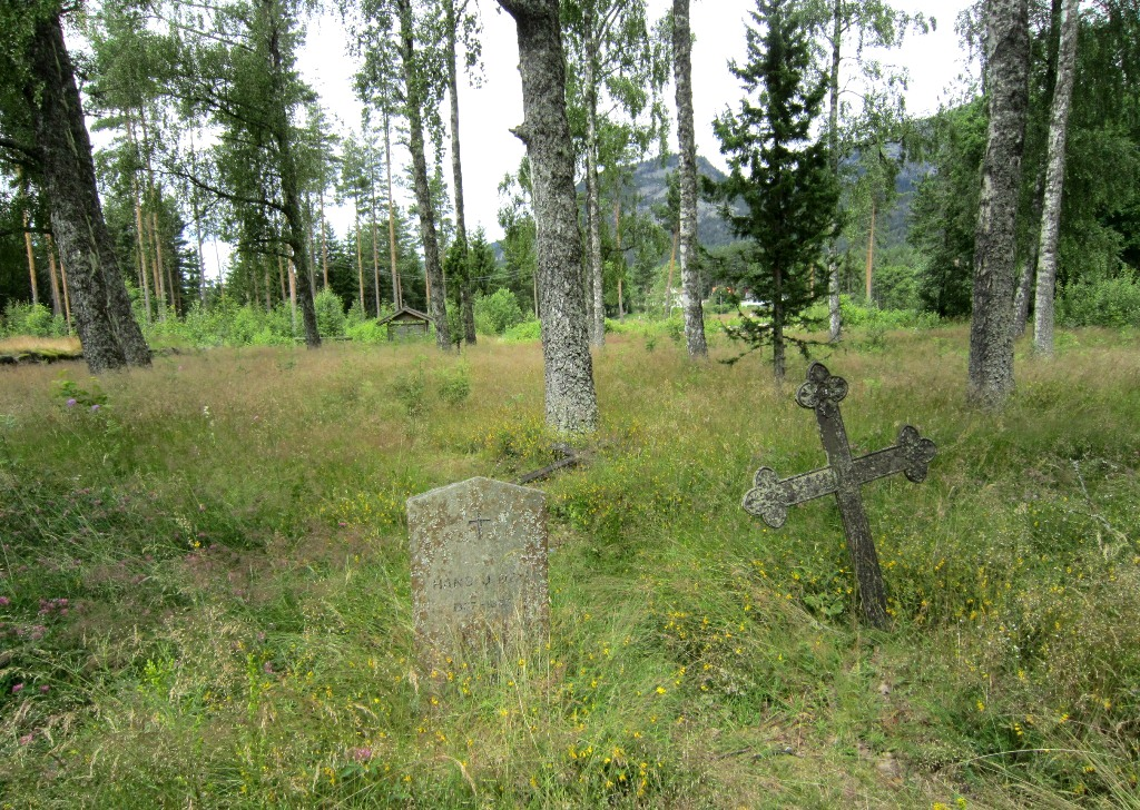 Vrådal gamle kirkegård, det tidligere kirkestedet i Vrådal